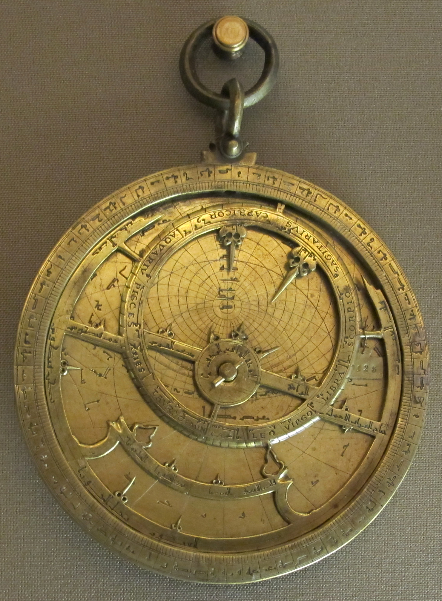 Museo di San Martino (Napoli)